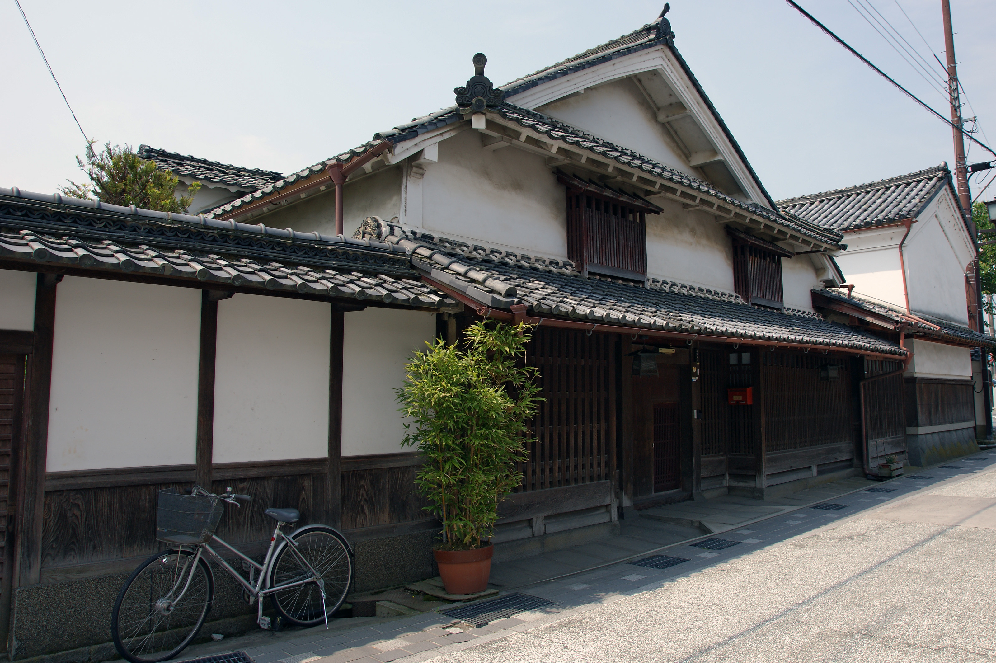 Kwara-machi in Sasayama, Hyogo prefecture, Japan